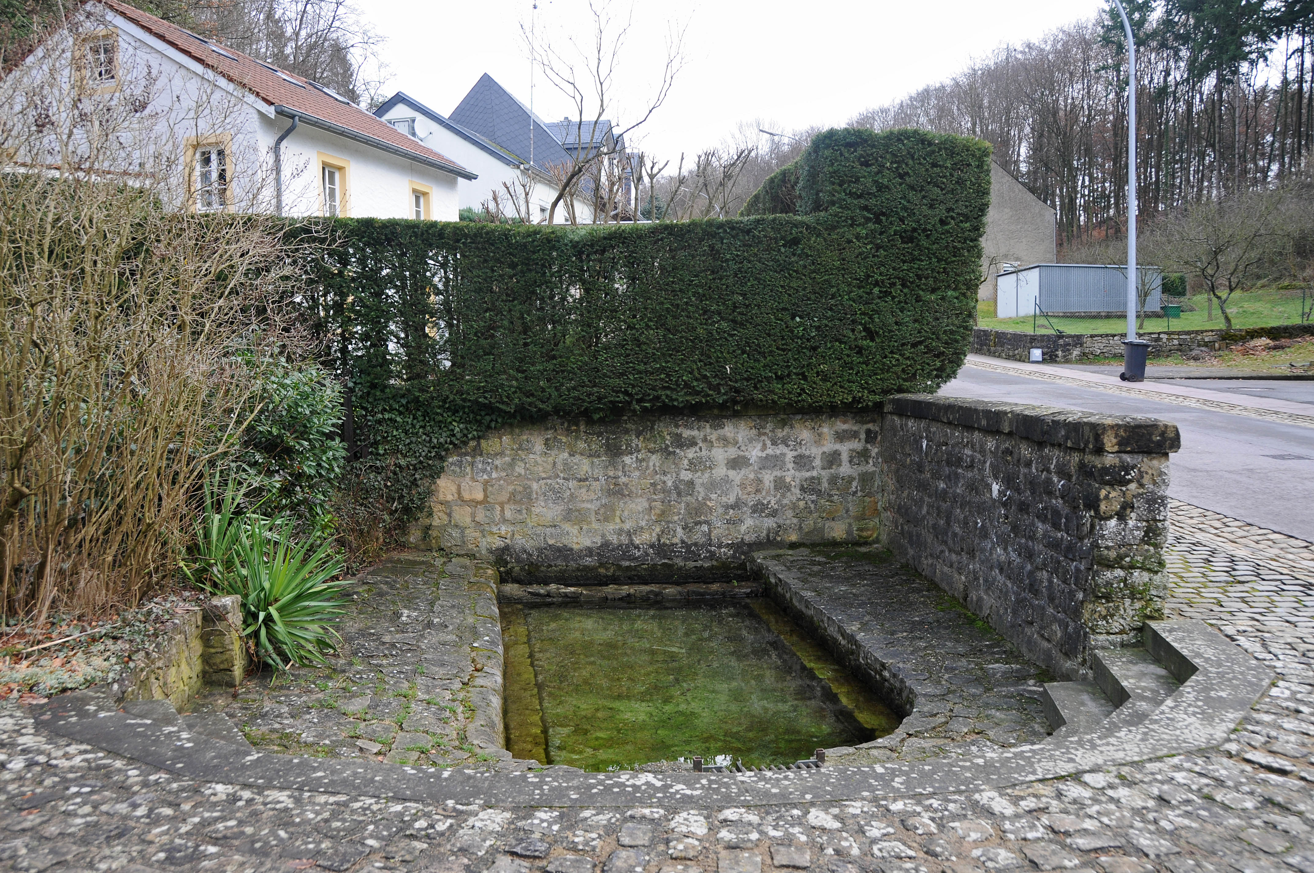 Source de la Syre à Syren (Luxembourg)